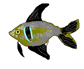 self drawn draft of Hyphessobrycon megalopterus